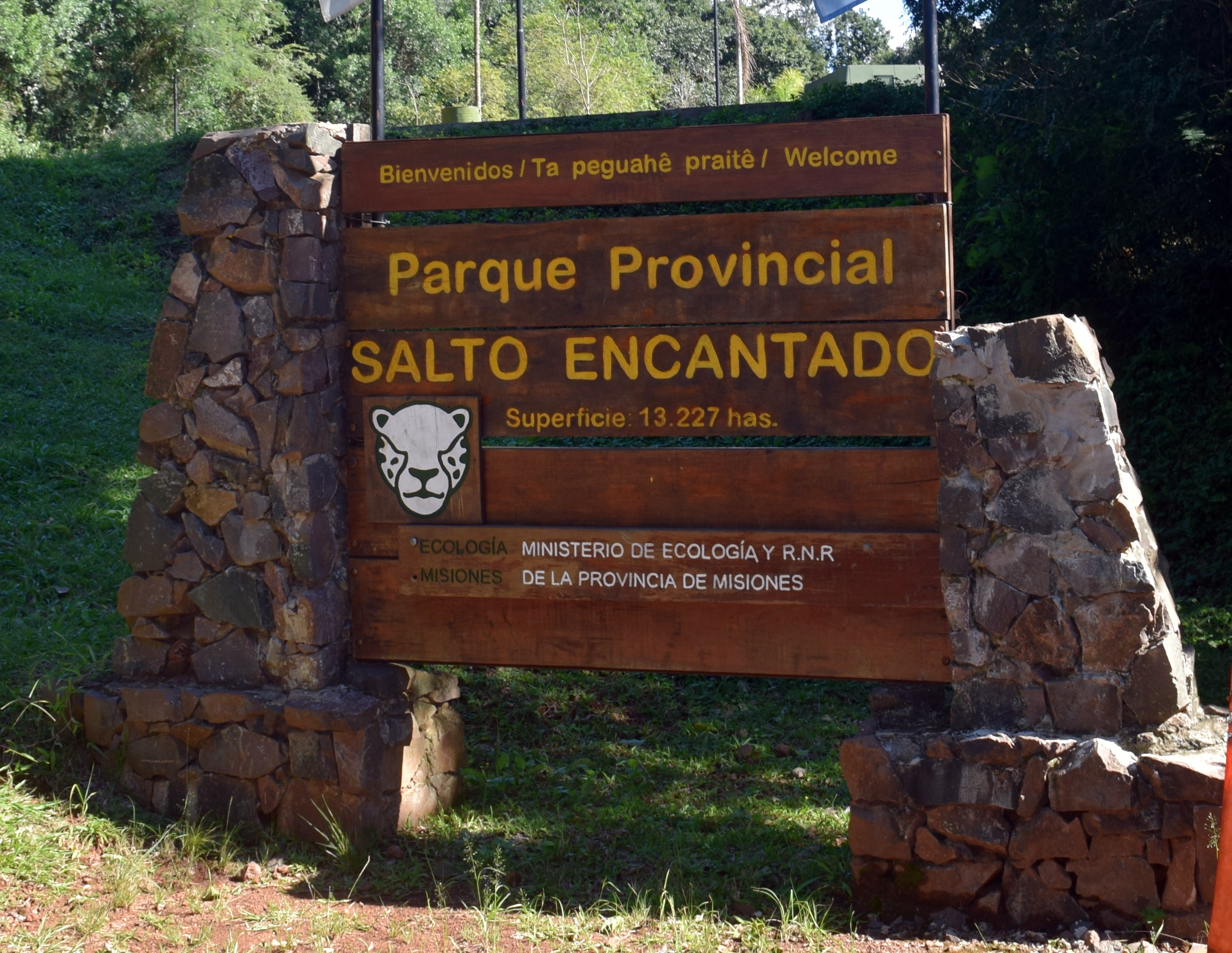 Cartel de acceso al Parque provincial Salto Encantado en la provincia de Misiones, Argentina.